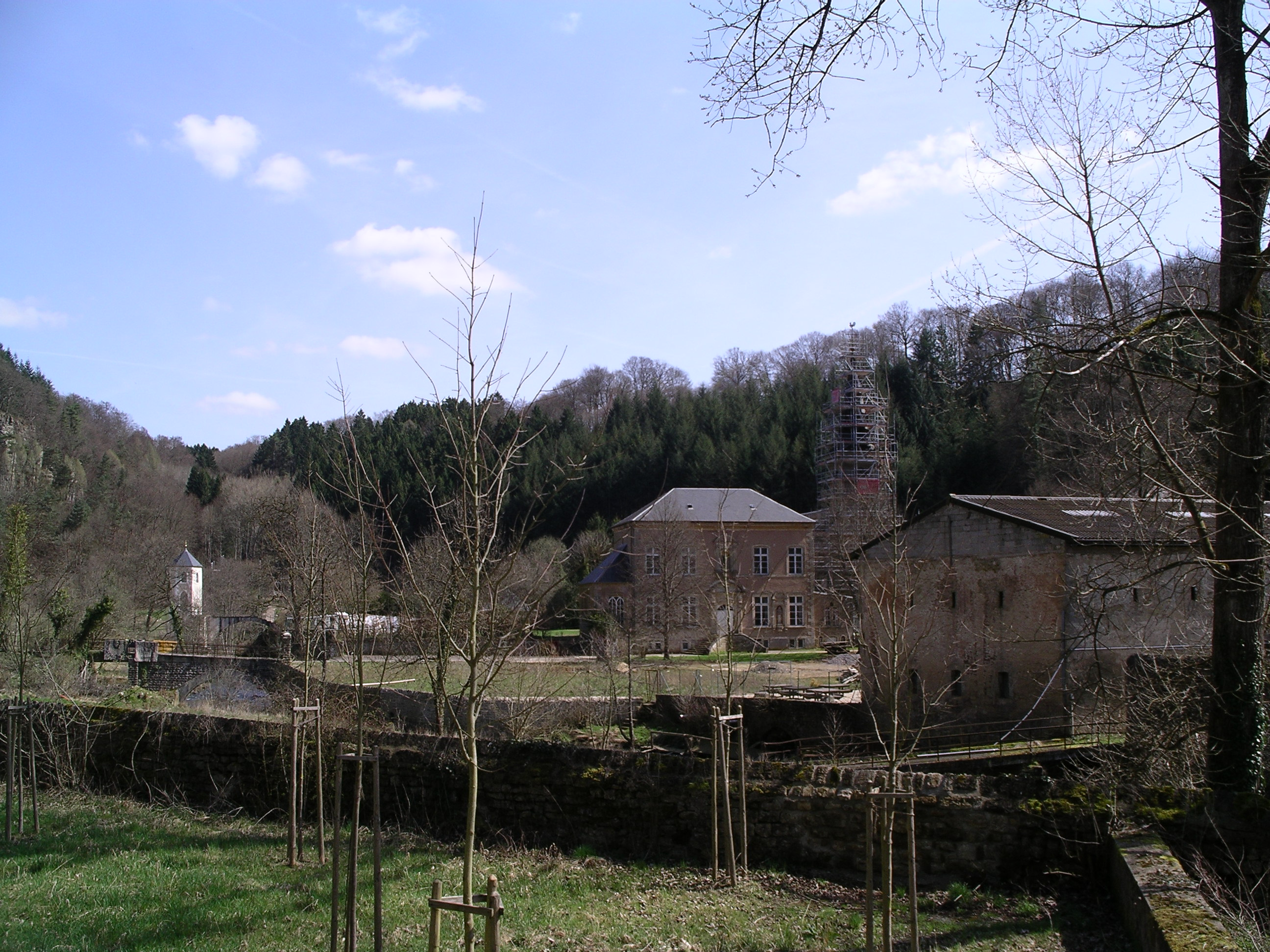 Kloster Marienthal, Gemeinde Tuntange (Luxemburg)